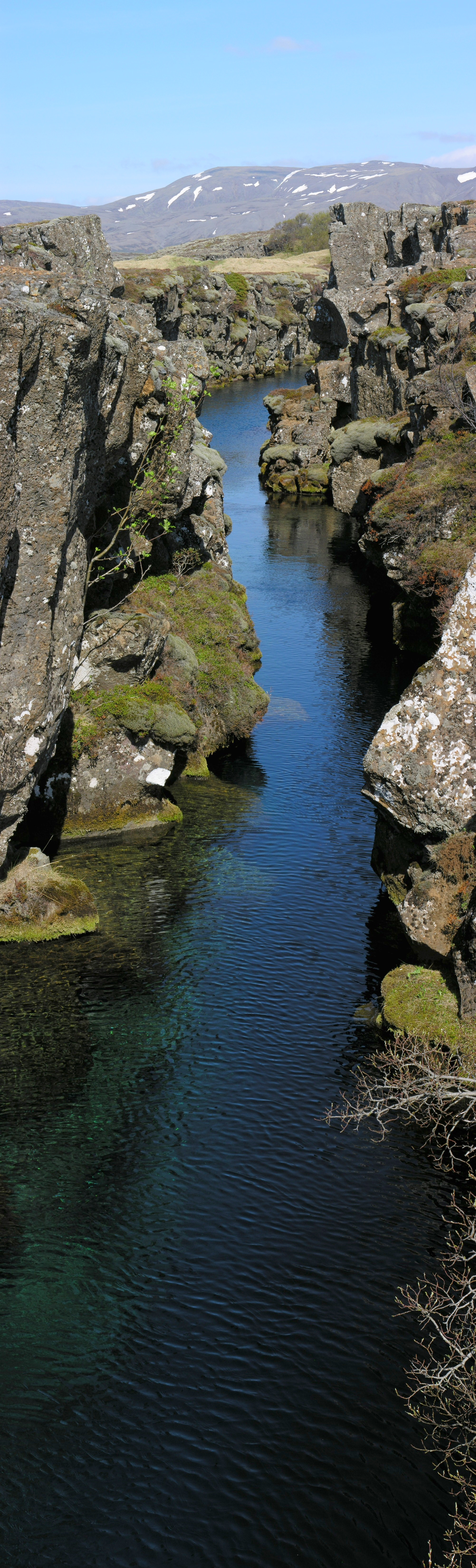 Flosagjá at Þingvellir